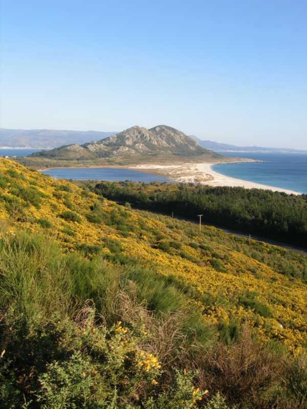 Vista do Monte Louro Licenza Categoría:Imaxes de Louro